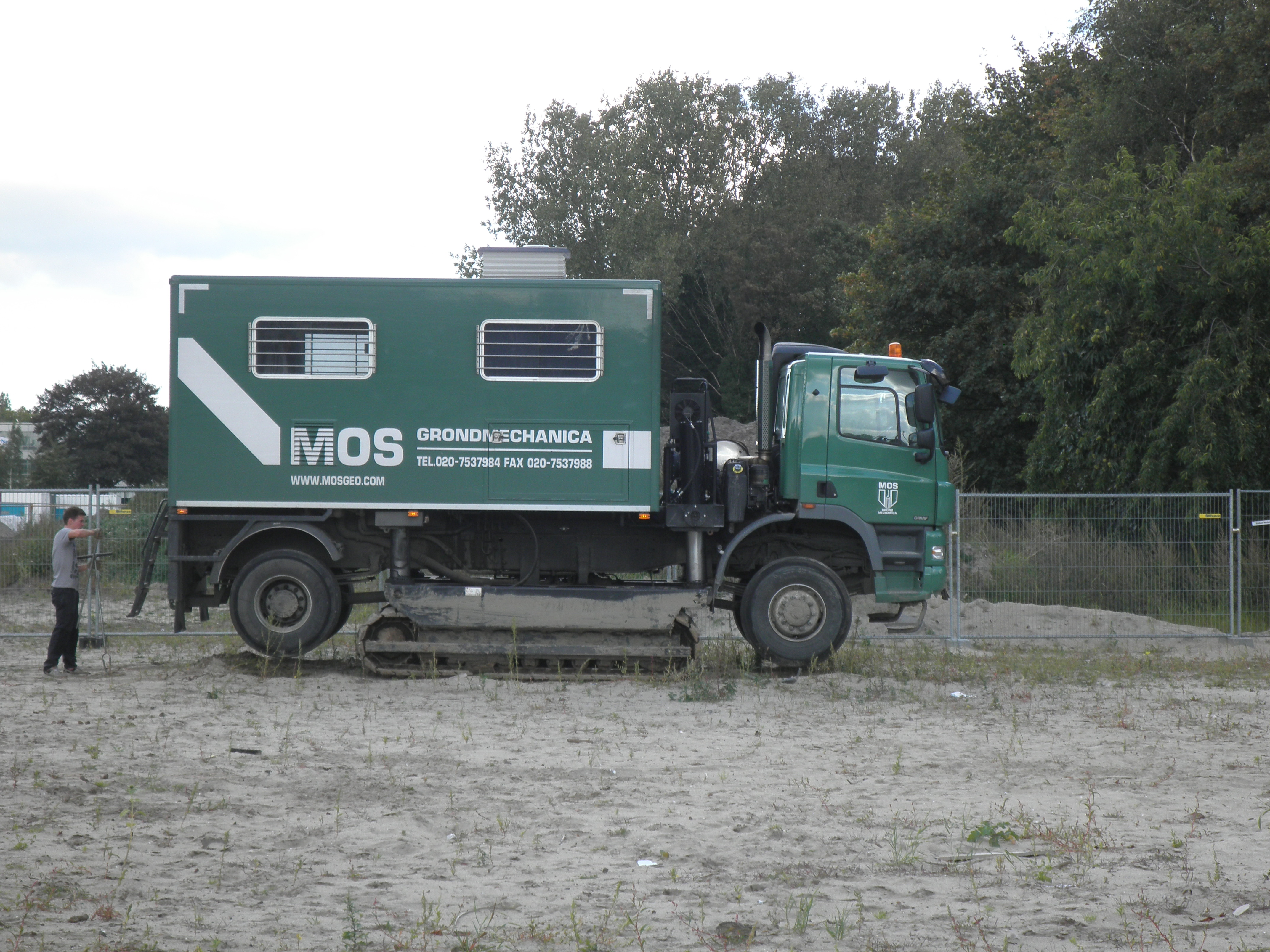 mécanique des sols